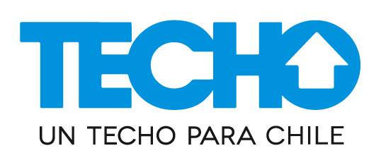 Logo Techo Chile, desde 04 de Julio 2011